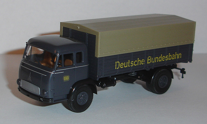 Automodell des Herstellers Brekina, darstellend einen Magirus Pluto LKW